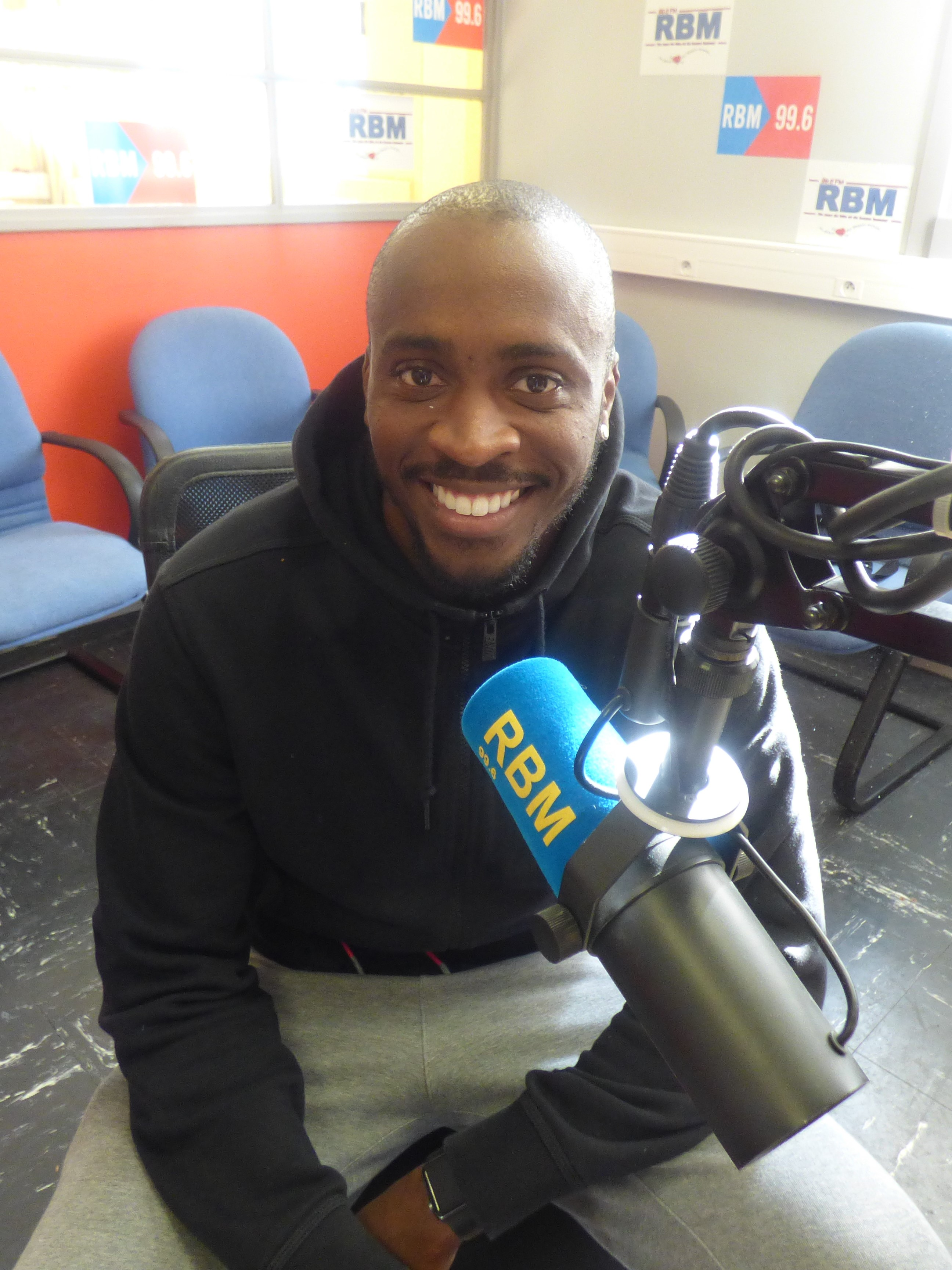 Gary Ambroise en mai 2019 dans les studios de RBM, à Billy-Montigny (Pas-de-Calais).